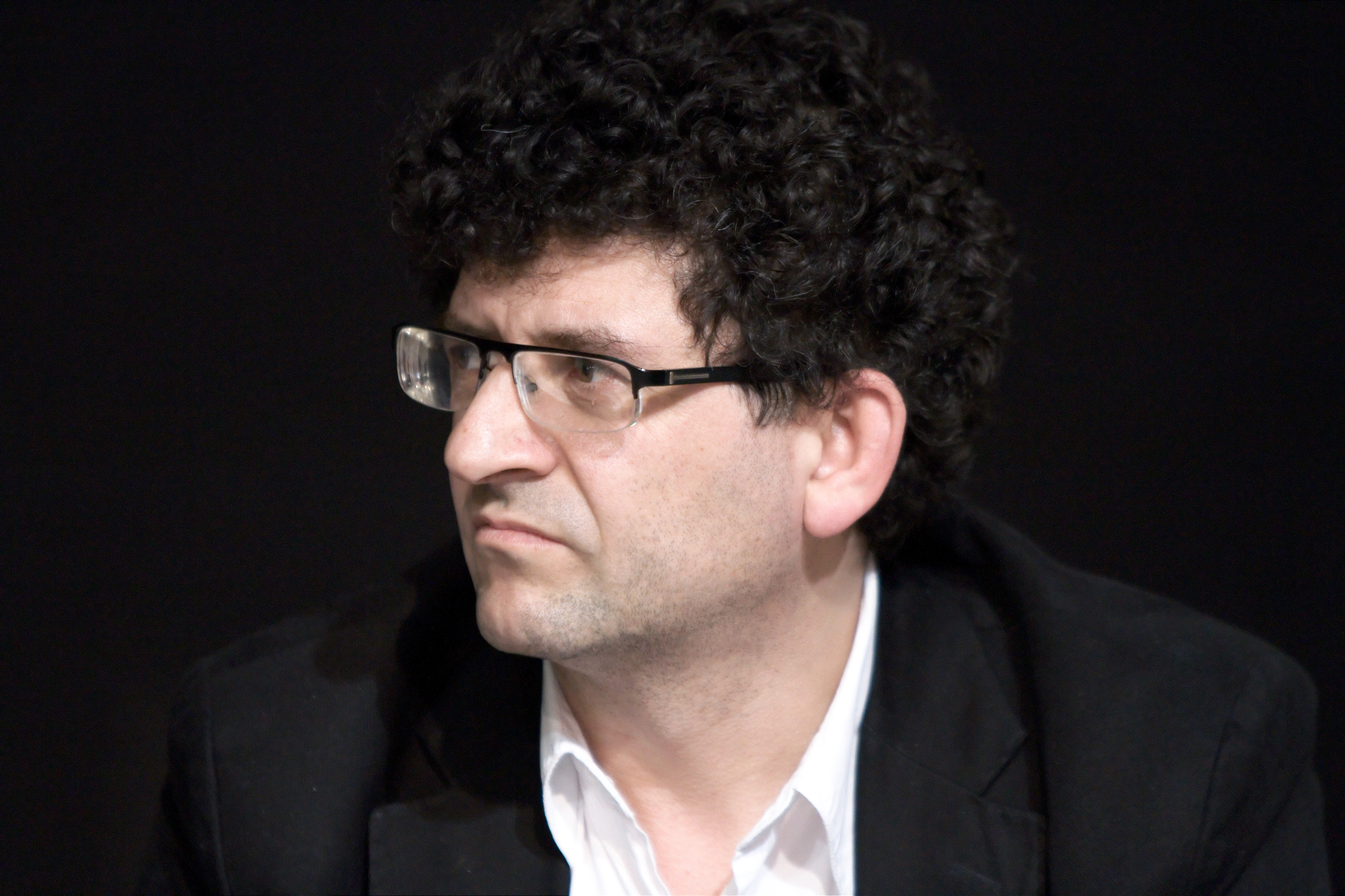 Pascal Riché, co-fondateur et rédacteur en chef du site , lors du Salon du livre de Paris pour la conférence Internet peut-il encore sauver la presse ?